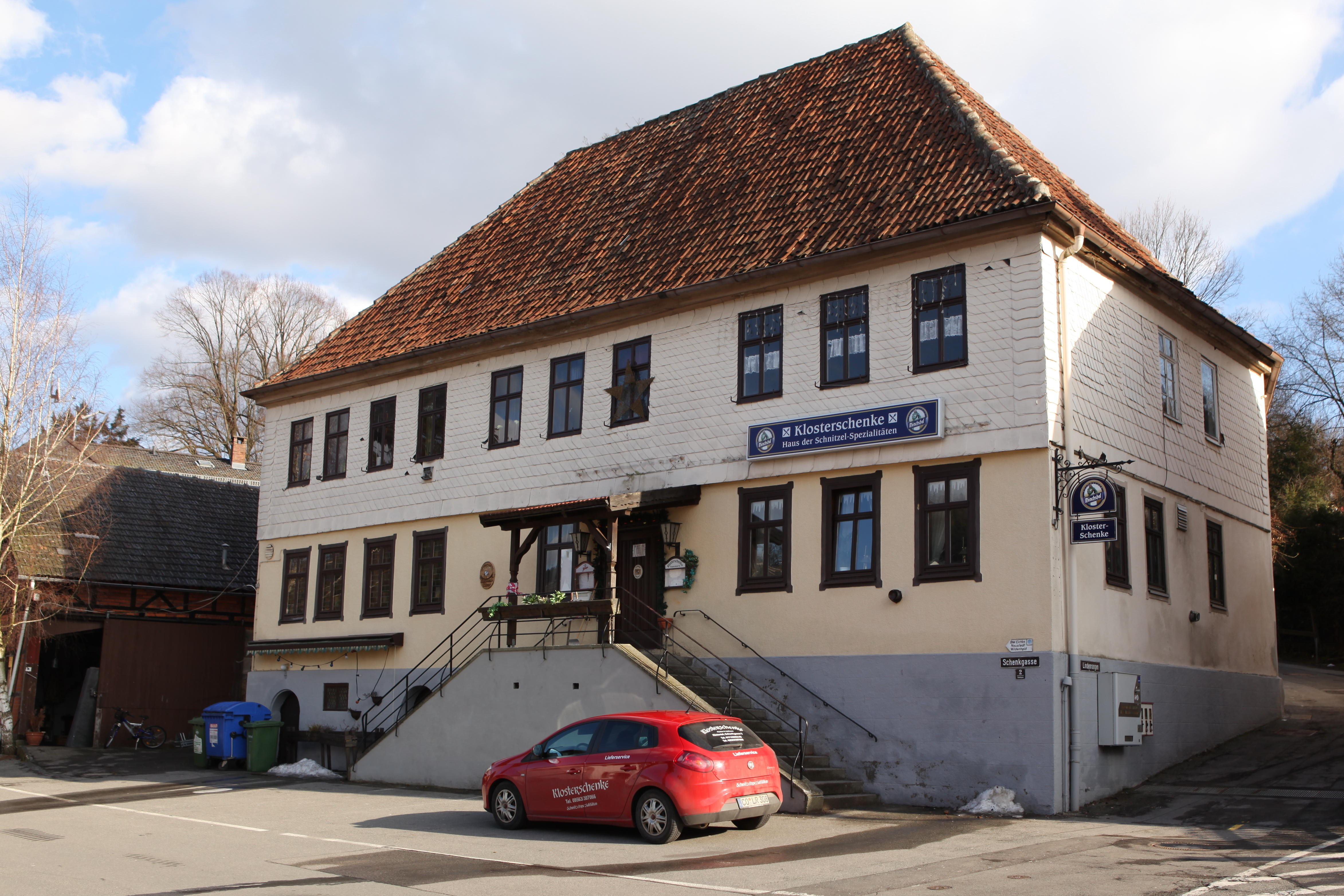 Schenkgasse 2 in Mönchröden, OT von Rödental